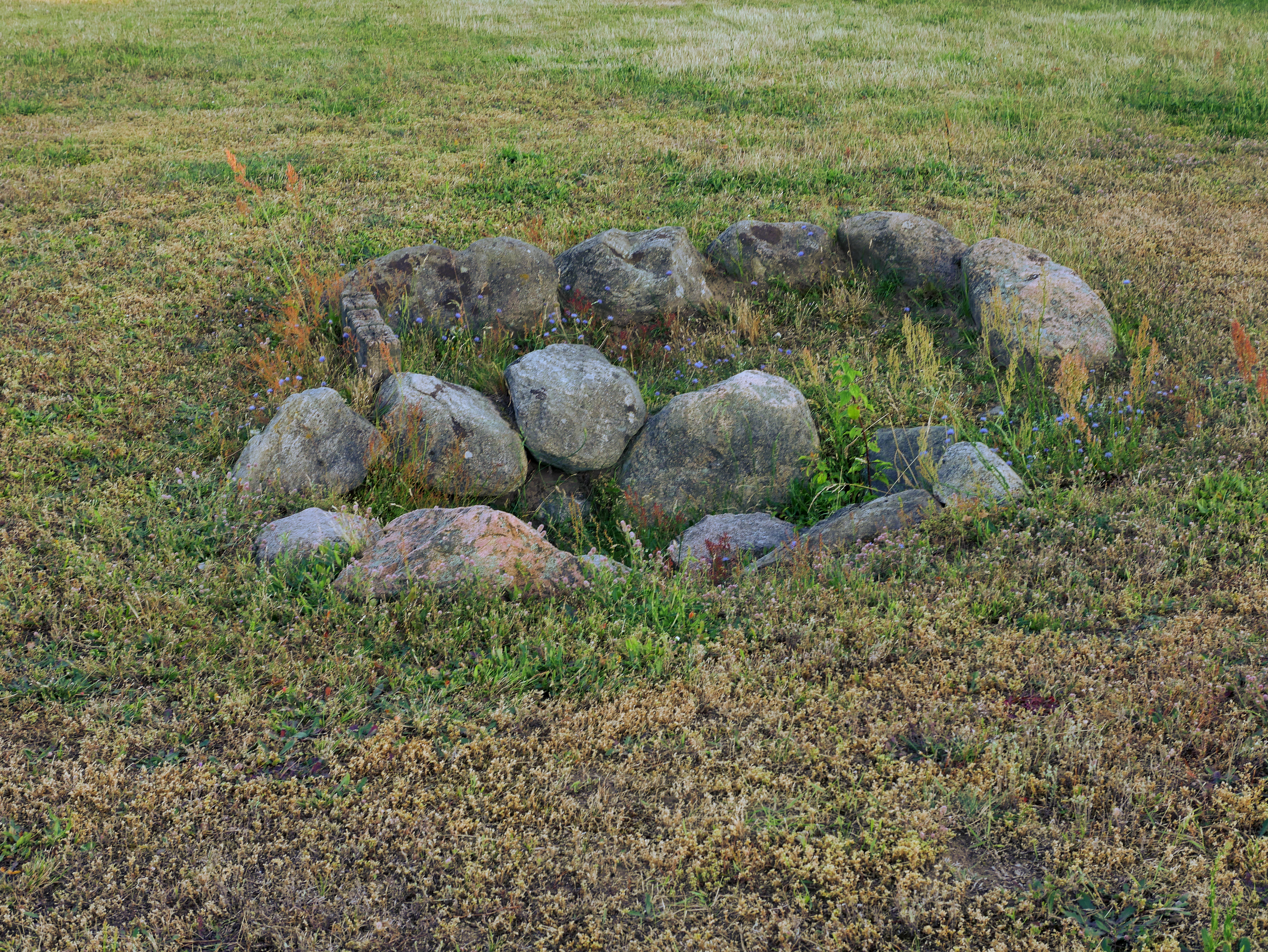 Havndal Steinkistengräber Grab 2 Die zweite Steinkiste ist von einer sehr speziellen Art und bisher für Dänemark einmalig. Sie kann als Rekonstruktion neben der Dorfschule besichtigt werden. Es handelt sich wahrscheinlich um ein Familiengrab mit vier Bestattungen. Der älteste Bau bestand aus einem hölzernen Raum, in dem nacheinander zwei Plankensärge deponiert wurden. Die Beigaben bestanden aus Keramik, Nadeln und Eisenmessern. Nachdem der Holzbau verfallen war, wurde die Steinkiste errichtet. Sie wurde mit einem höheren, in den Boden eingetieften Vorraum versehen, der zum Grabraum hin mit Holzbalken verschlossen war. Die Anlage wurde aus Schichten großer Steine errichtet und war vermutlich mit Holz verkleidet. Die Skelette lagen auf der Seite mit angezogenen Knien, der Kopf lag im Westen und das Gesicht zeigte nach Süden.